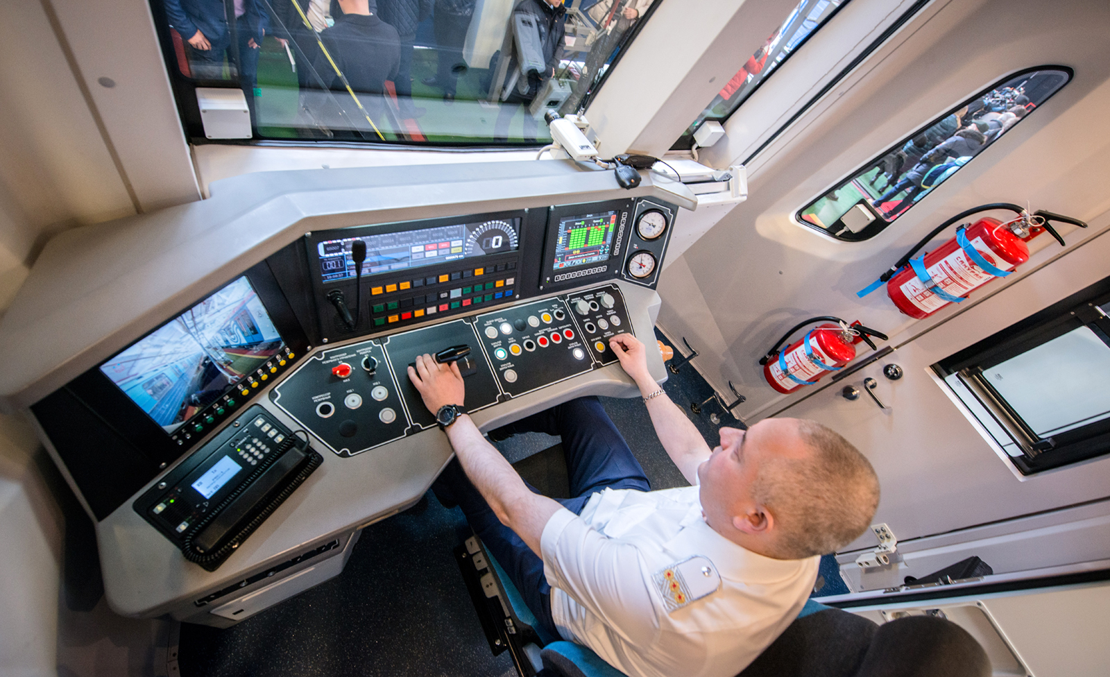 Кабина машиниста электропоезда метро 81-765/766/767 «Москва»